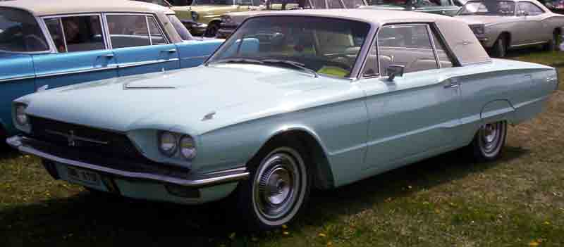 Ford Thunderbird 1966